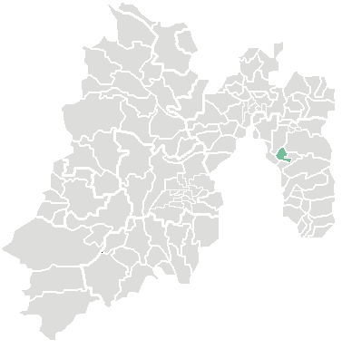 locatie van de gemeente Chimalhuacán in Mexico (staat)